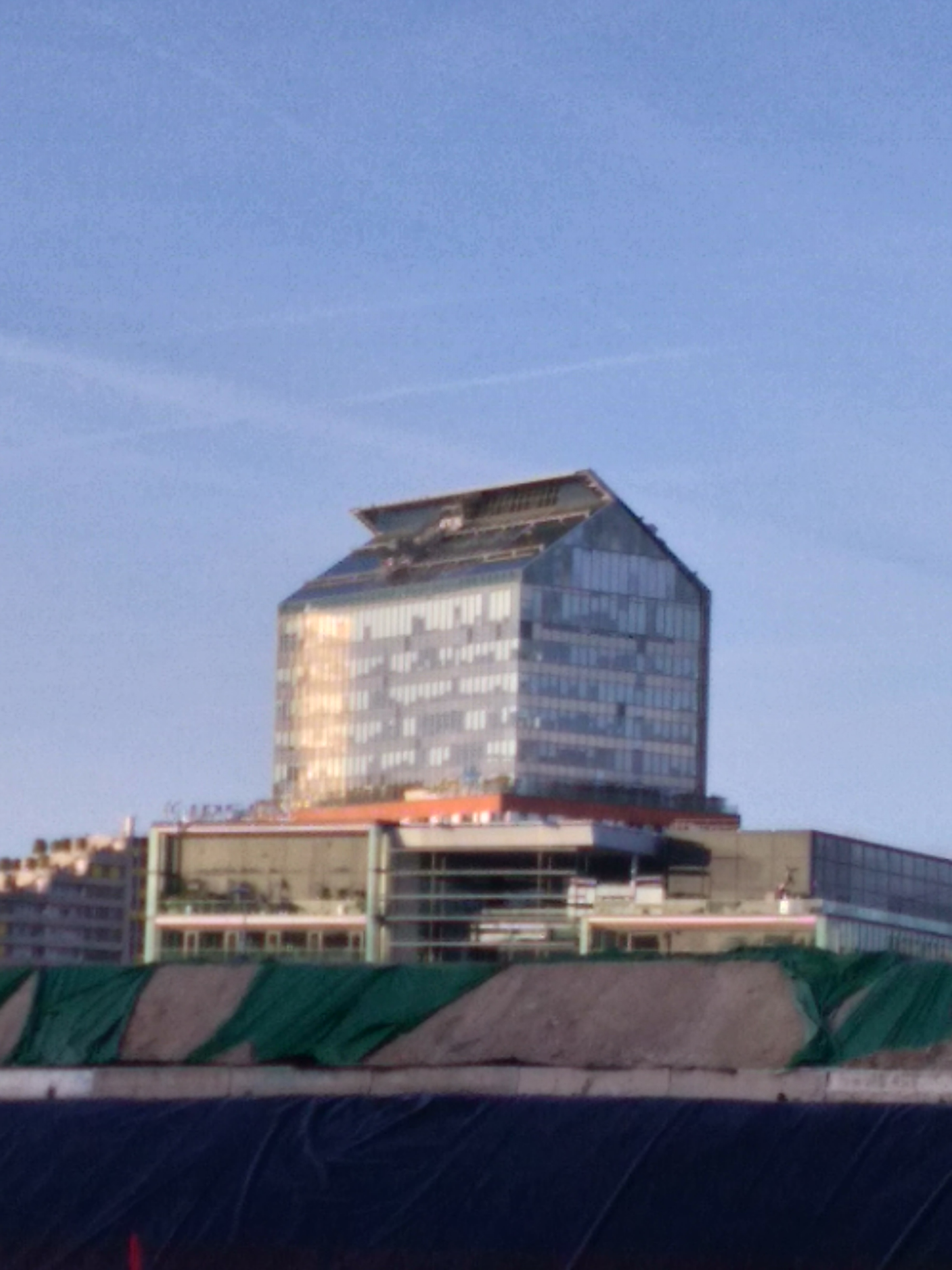 Tours Horizons, vues depuis les quais de Seine à Meudon-sur-Seine, mars 2019